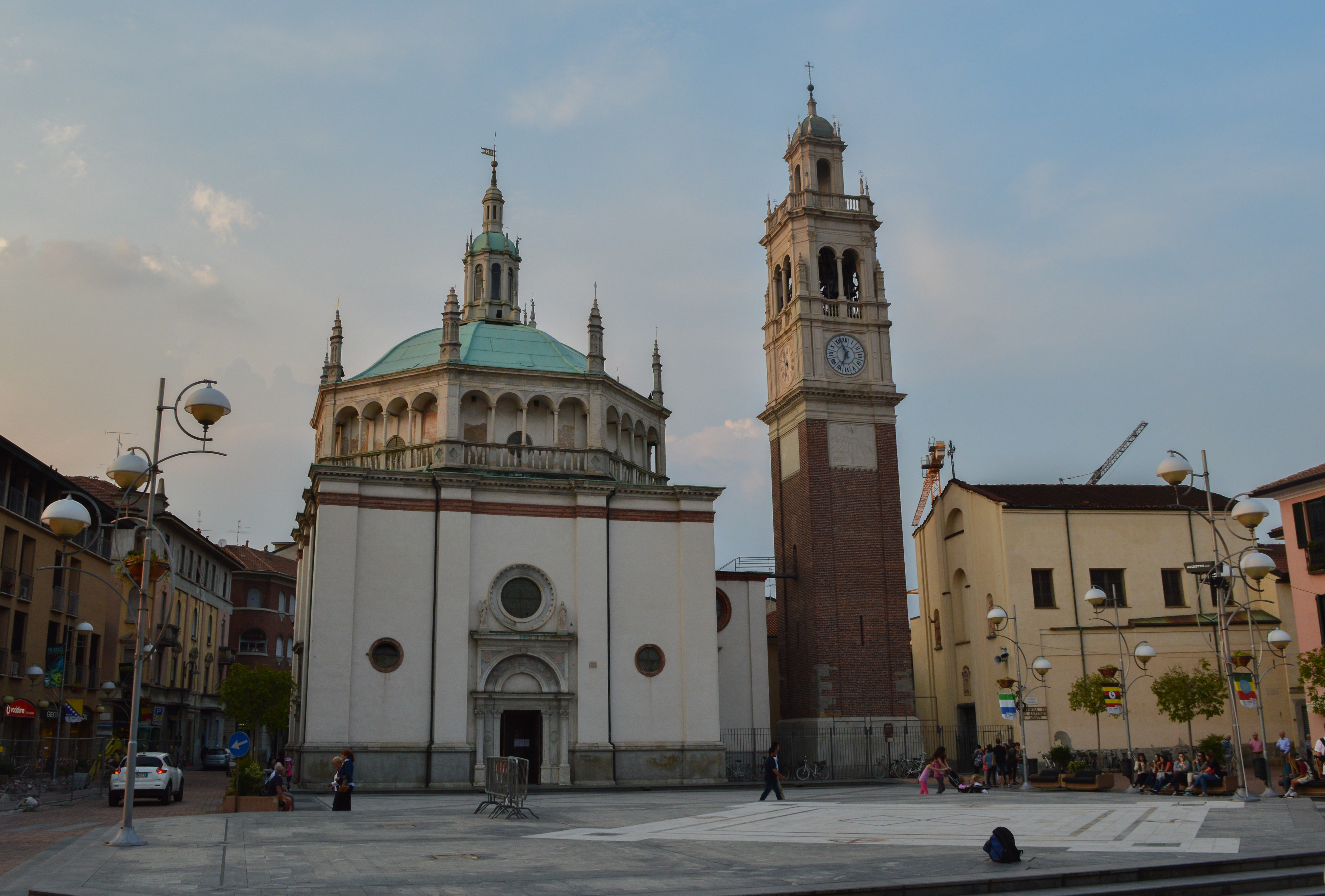 Santuario di Santa Maria di Piazza This is a photo of a monument which is part of cultural heritage of Italy.